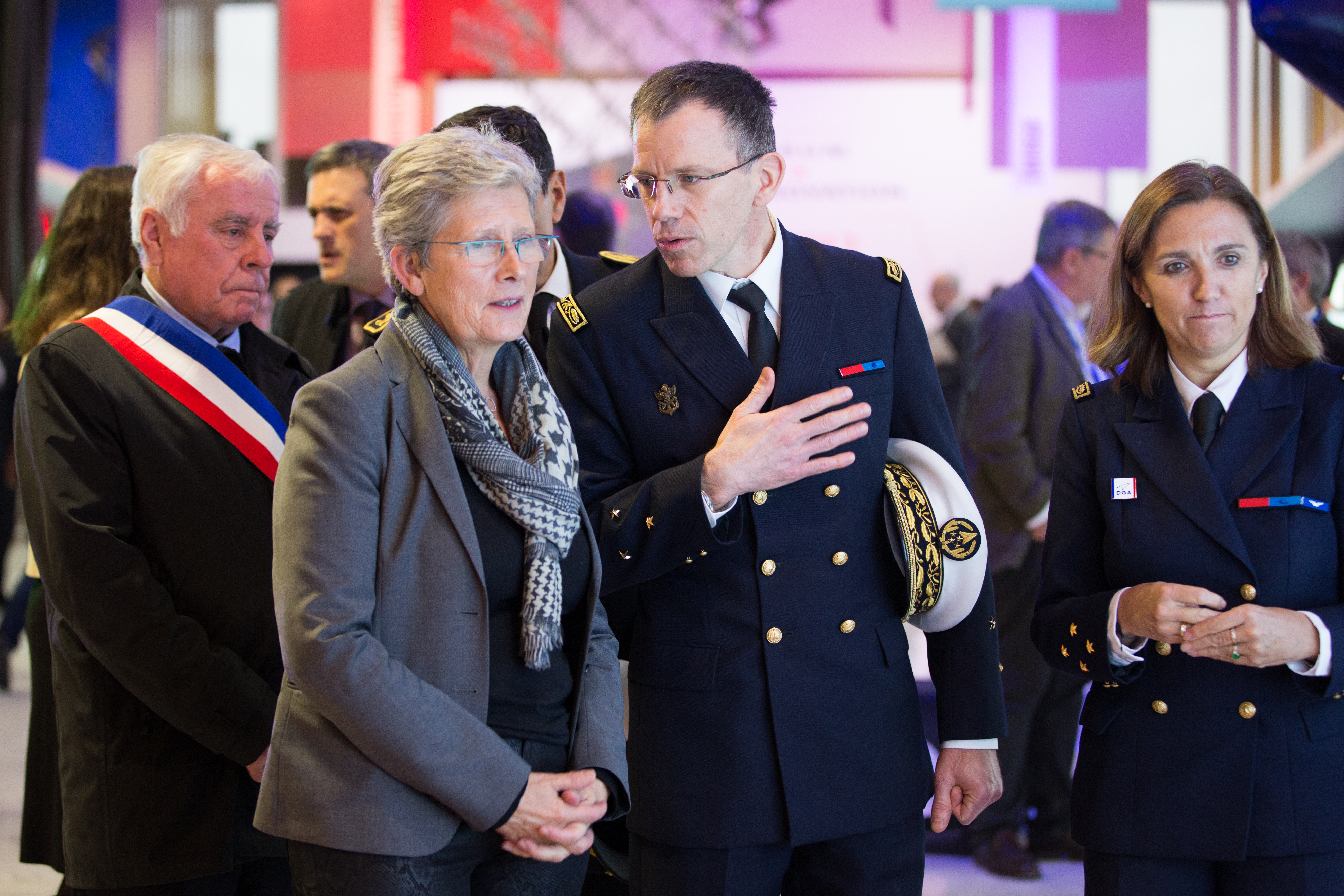 Visite de Geneviève Darrieussecq Secrétaire d'Etat auprès du ministre des Armées à l'Ecole polytechnique à l'occasion du forum innovation de la DGA